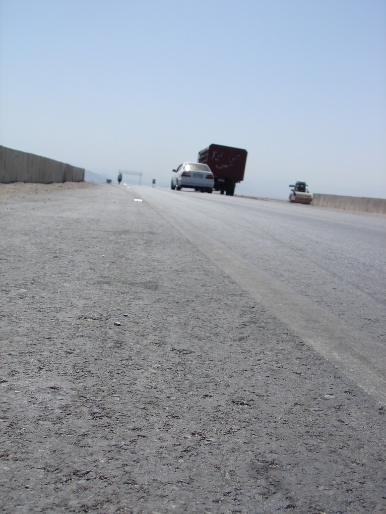 Highway from Jalalabad to Kabul in 2007.